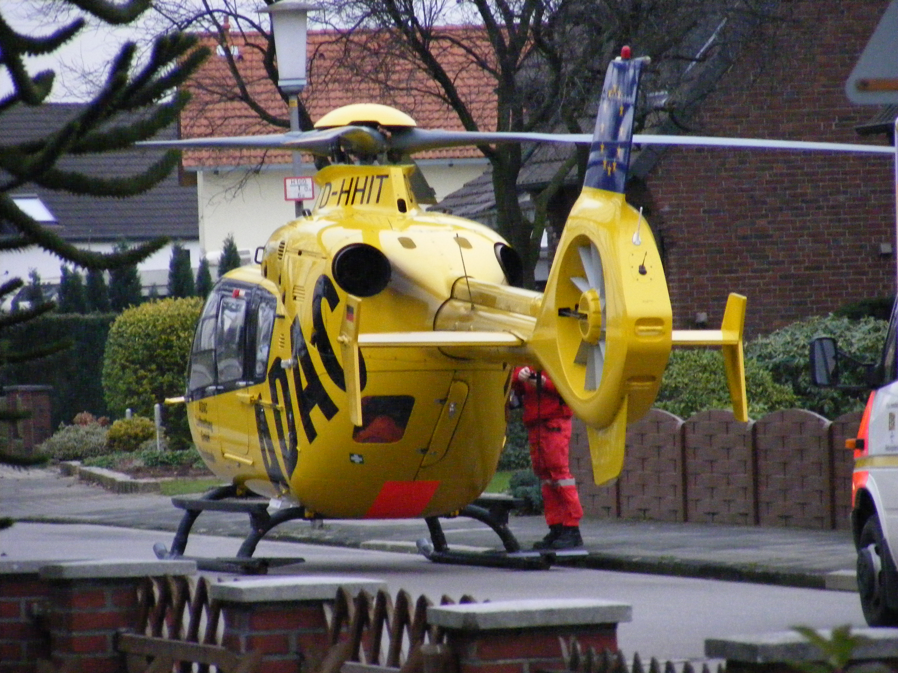 Eurocopter EC 135 im Rettungseinsatz in Oberbruch